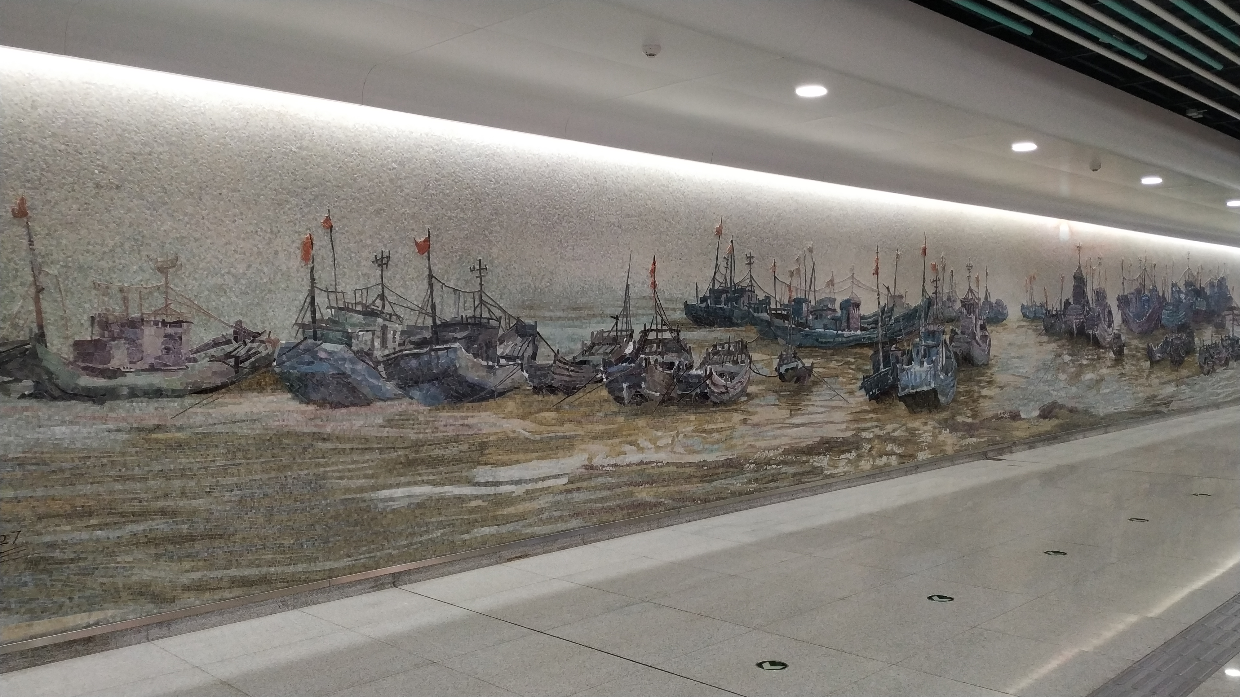 中文（中国大陆）: 积米崖站壁画